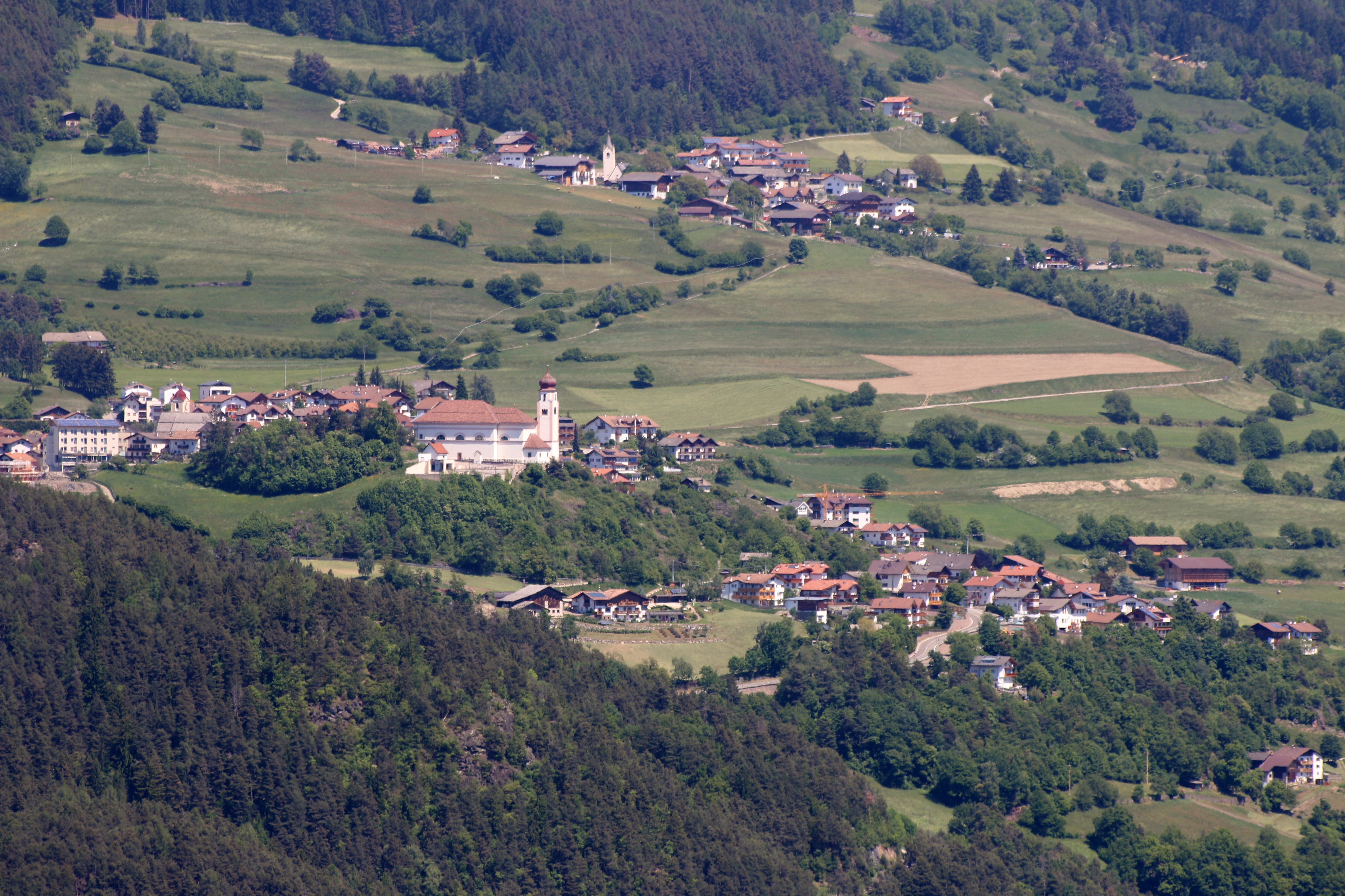 Barbian, Südtirol: Blick nach Lajen und Tschöfas